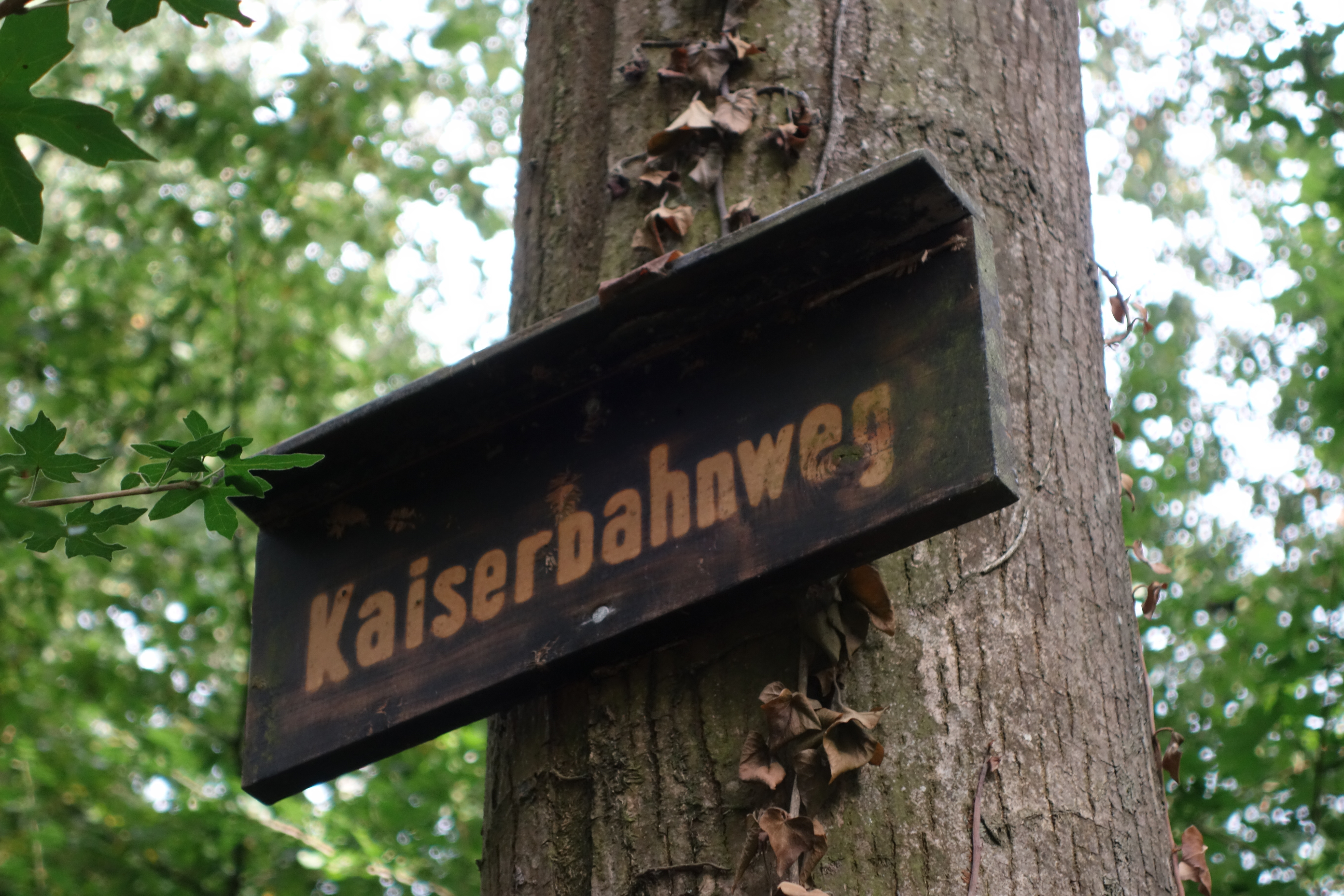 Wegschild des Kaiserbahnwegs im Frankfurter Niedwald Niedwald, wo sich einst die auf Geheiß KIaiser Wilhelms II errichte Verbindungskurve befand der Bäderbahn Bad Nauheim-Wiesbaden